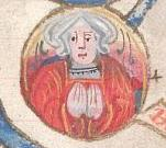 Brigída de York, princesa de york.